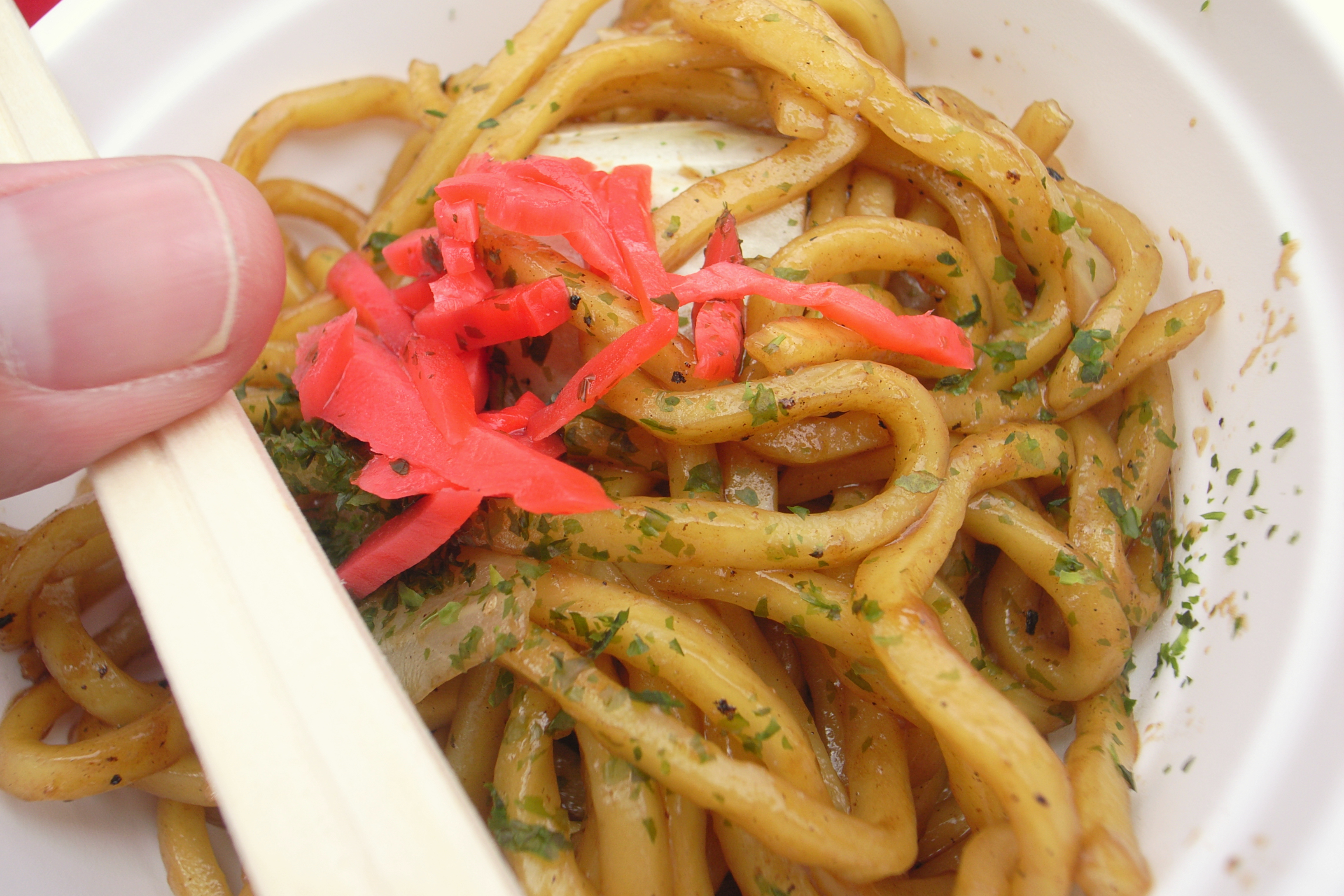 麺が太いので、口当たりがどろっとしている……